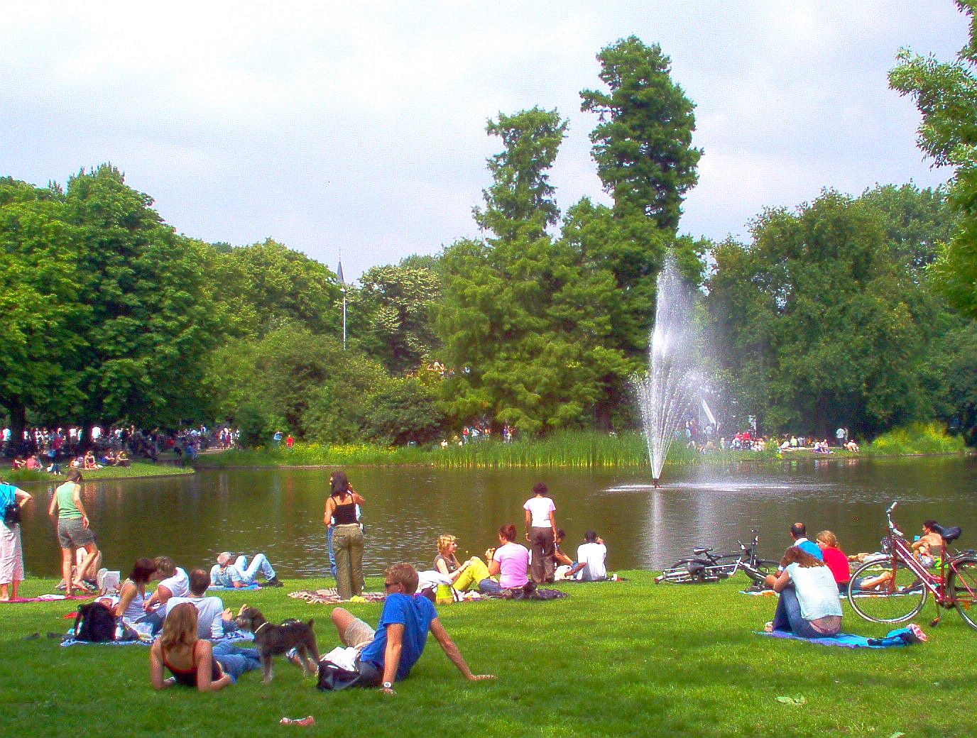 Vondelpark Amsterdam Holland.